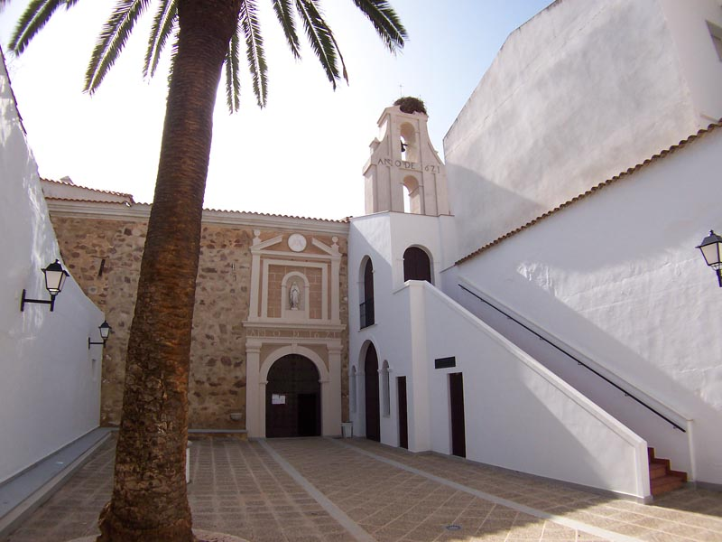 Patio del Convento del siglo XVII